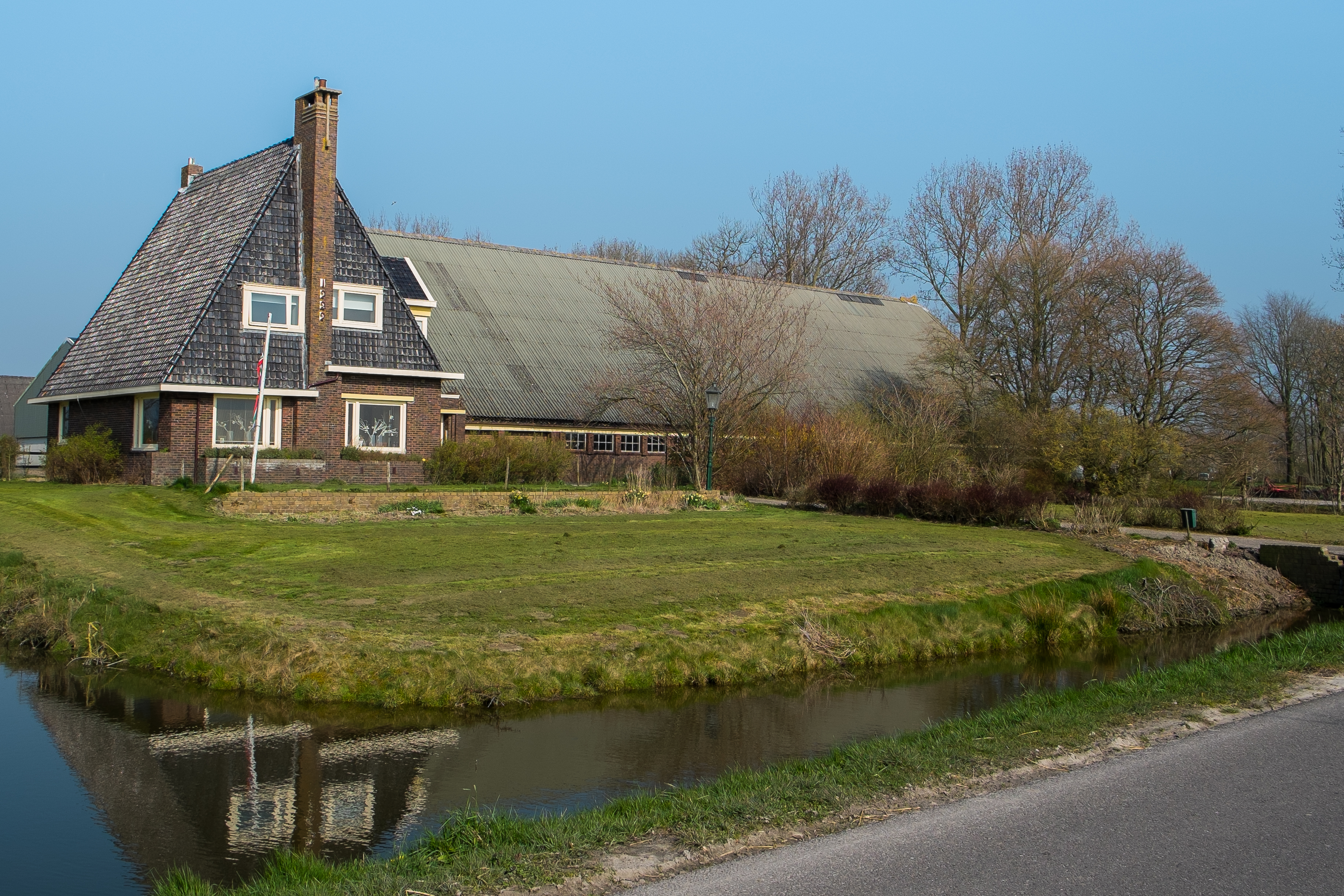 De Hayemaheerd bij Zuurdijk. Ontworpen in 1929 in de stijl van de Amsterdamse School door Willem Reitsema.